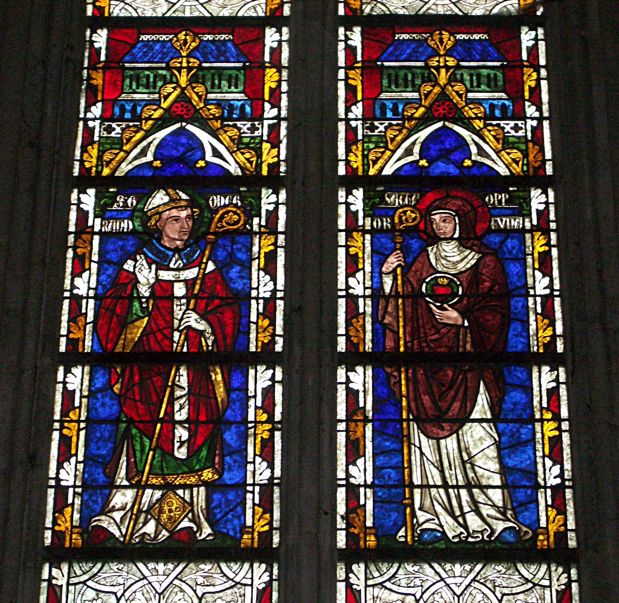 Saint Godegrand et Sainte Opportune, vitrail de la cathédrale de Sées dans l'Orne